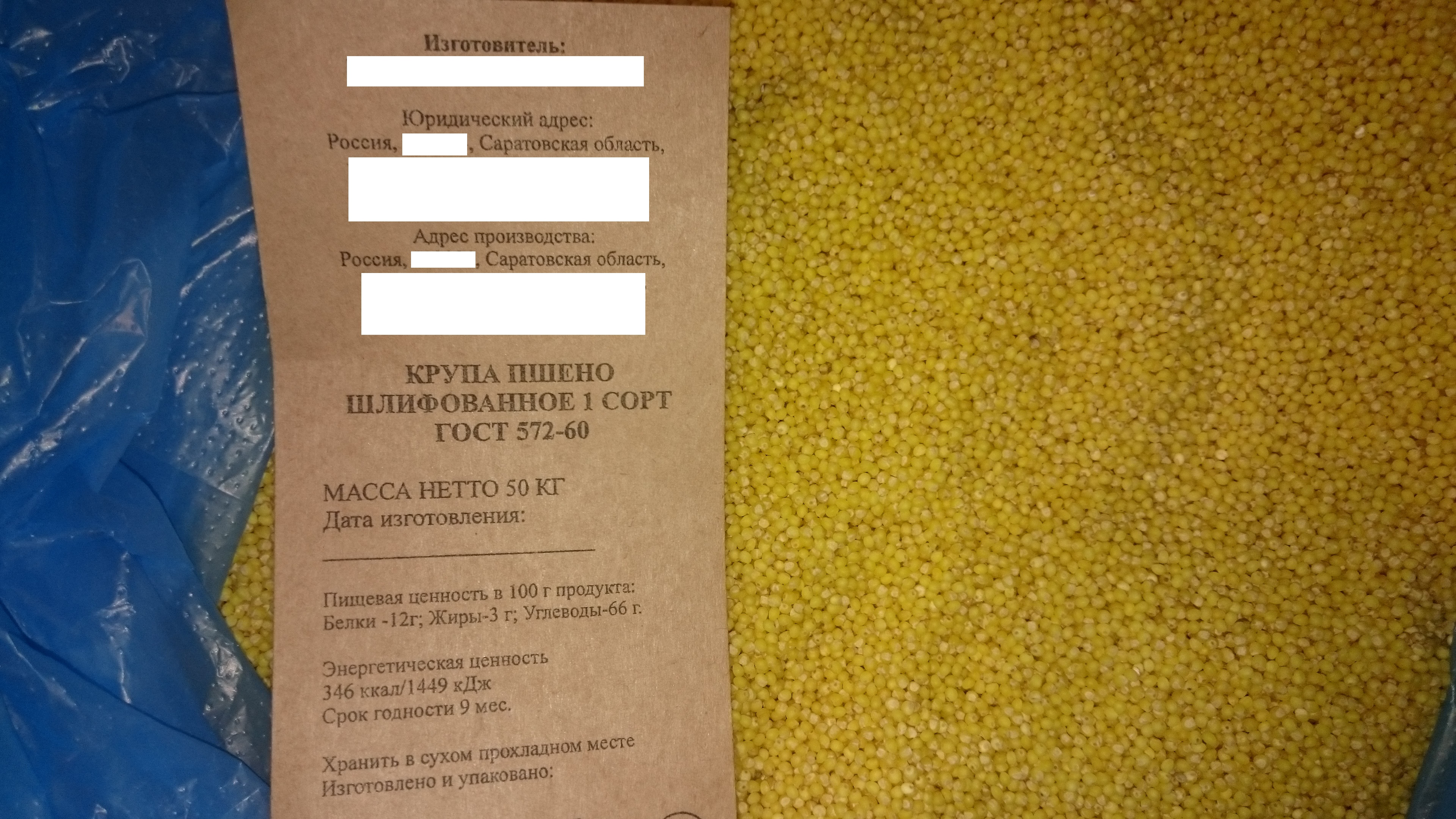 Пшено, 1 сорт, ГОСТ 572-60